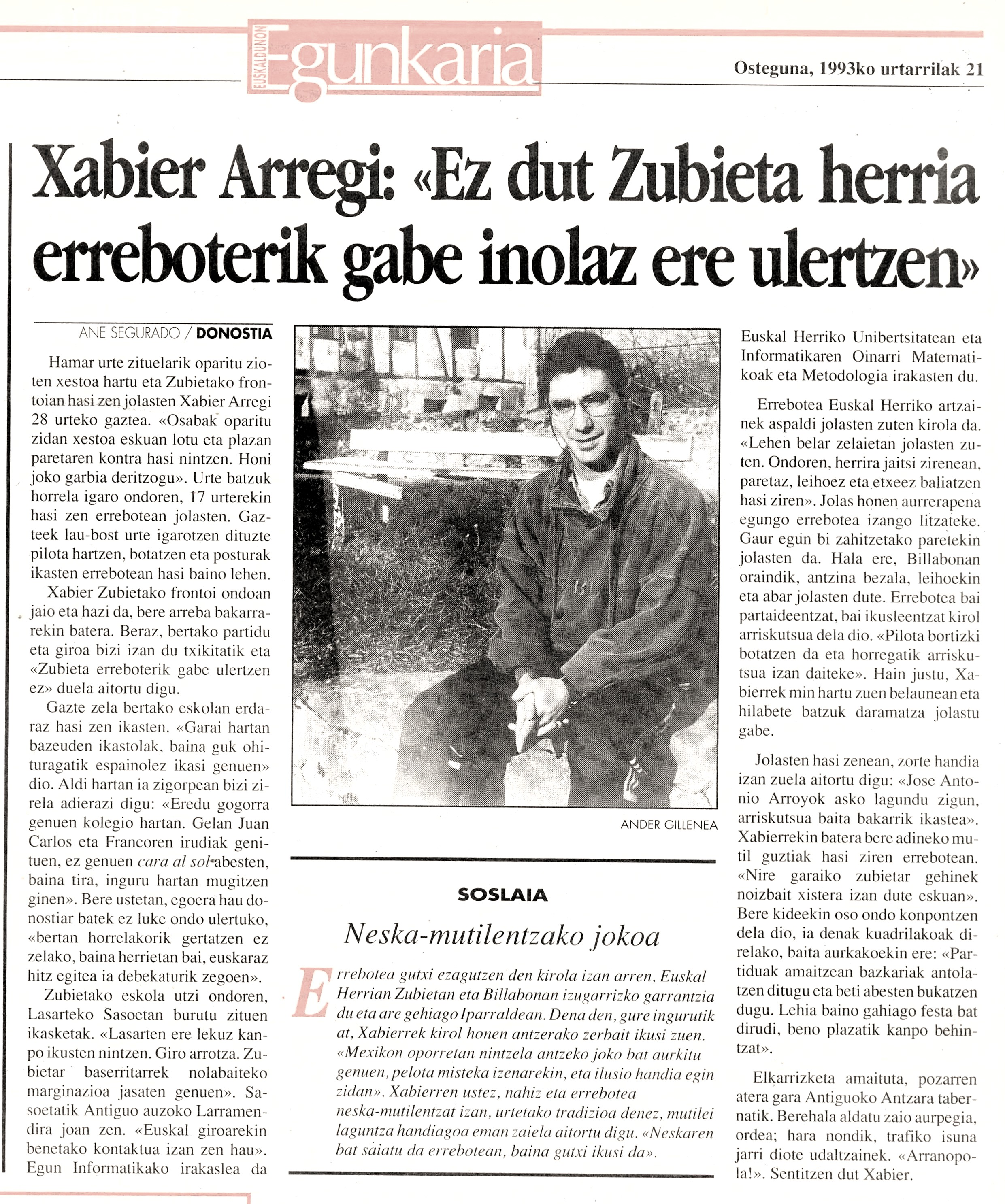 Elkarrizketa Euskaldun Egunkarian Xabier Arregi Iparragirrerekin, Zubietako errebotezalea eta jokalaria (1993-01-21)